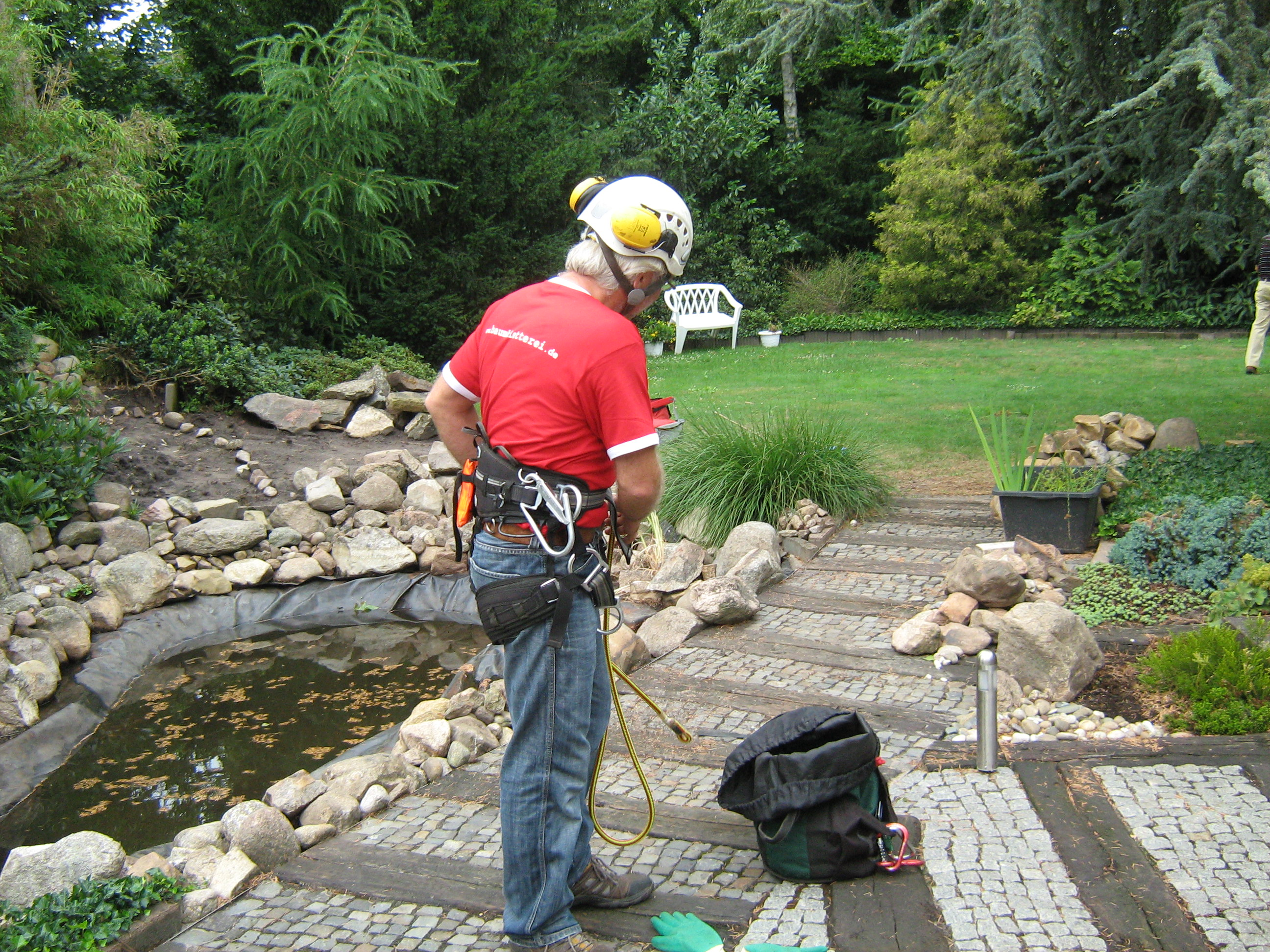 Baumkletter Ausrüstung